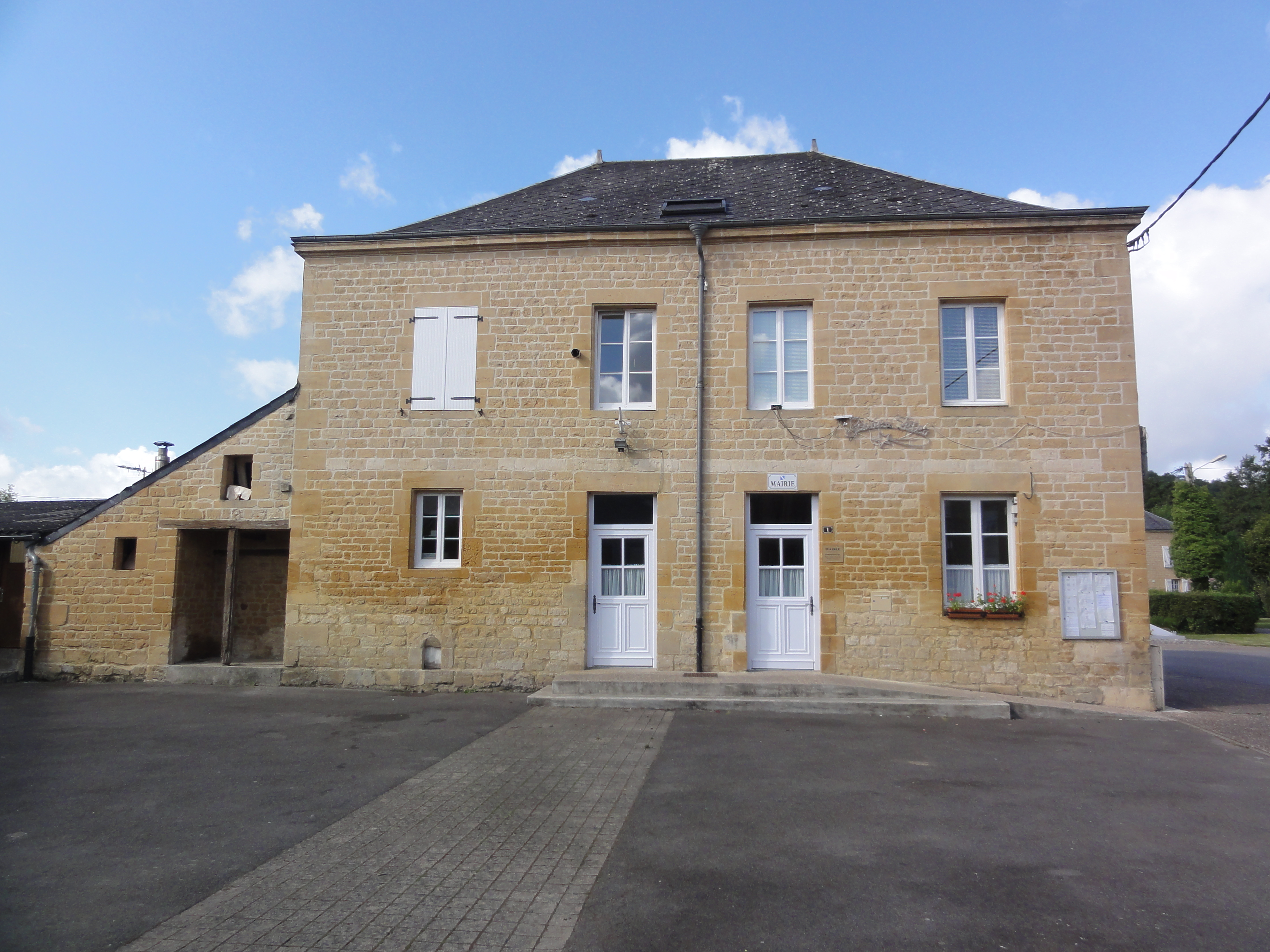 Clavy-Warby (Ardennes) la mairie à Clavy